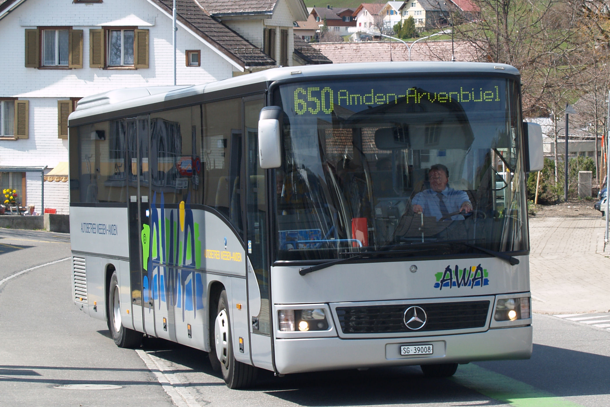 Ein Autobus des Autobetrieb Weesen Amden (AWA), bei der Wegfart bei der Haltestelle Amden Post.